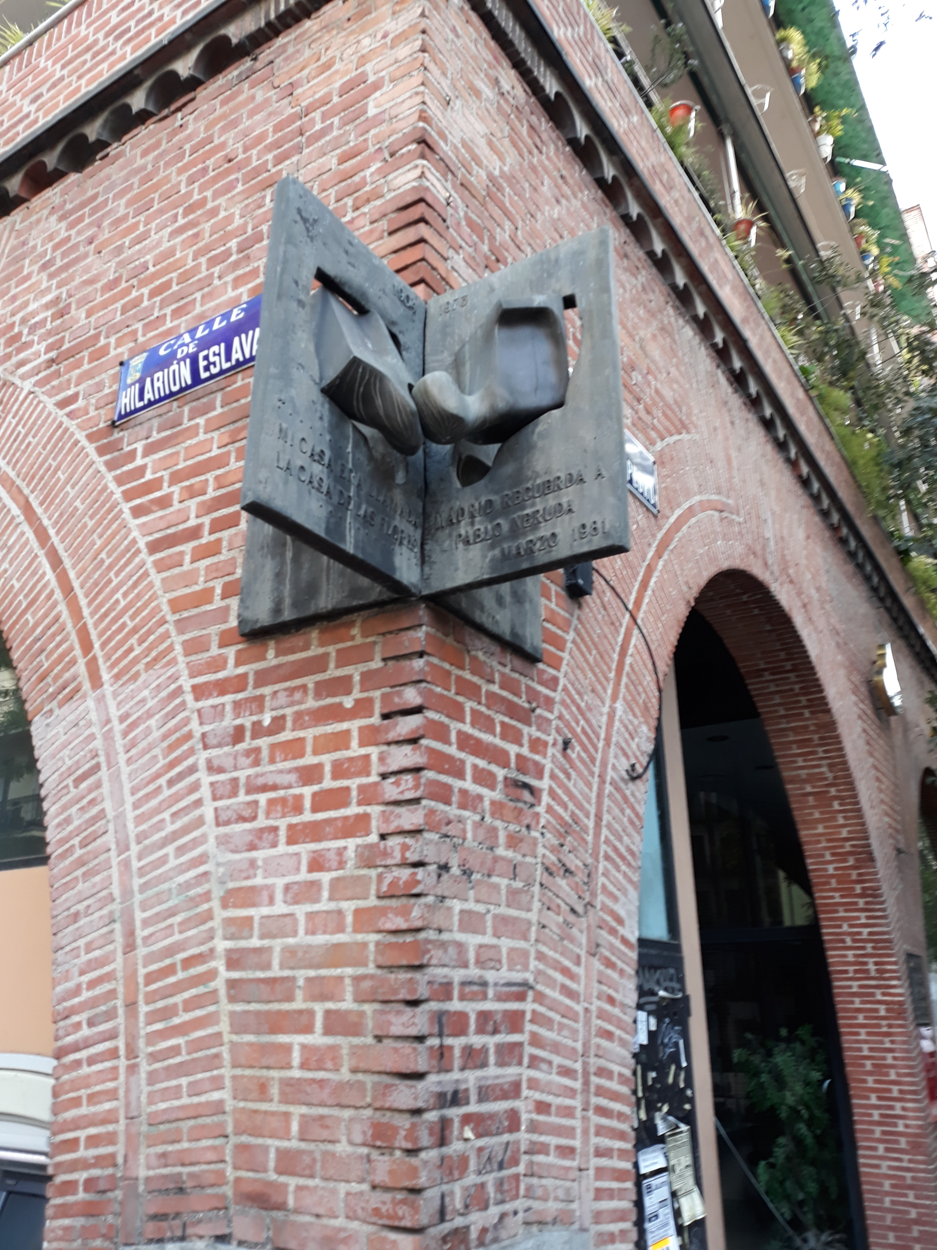 Gedenktafel für den chilenischen Dichter Pablo Neruda in Madrid, La Casa de las Flores.